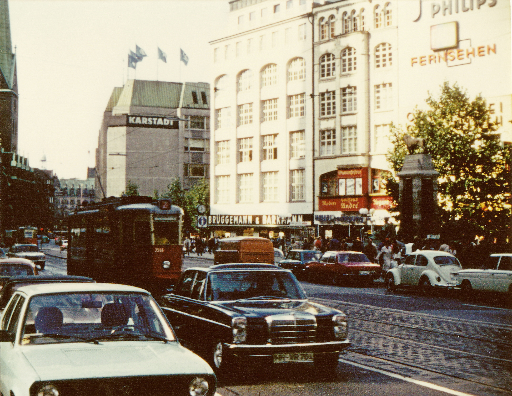 Hamburg, Mönckebergstraße mit Straßenbahnen im Mai 1977